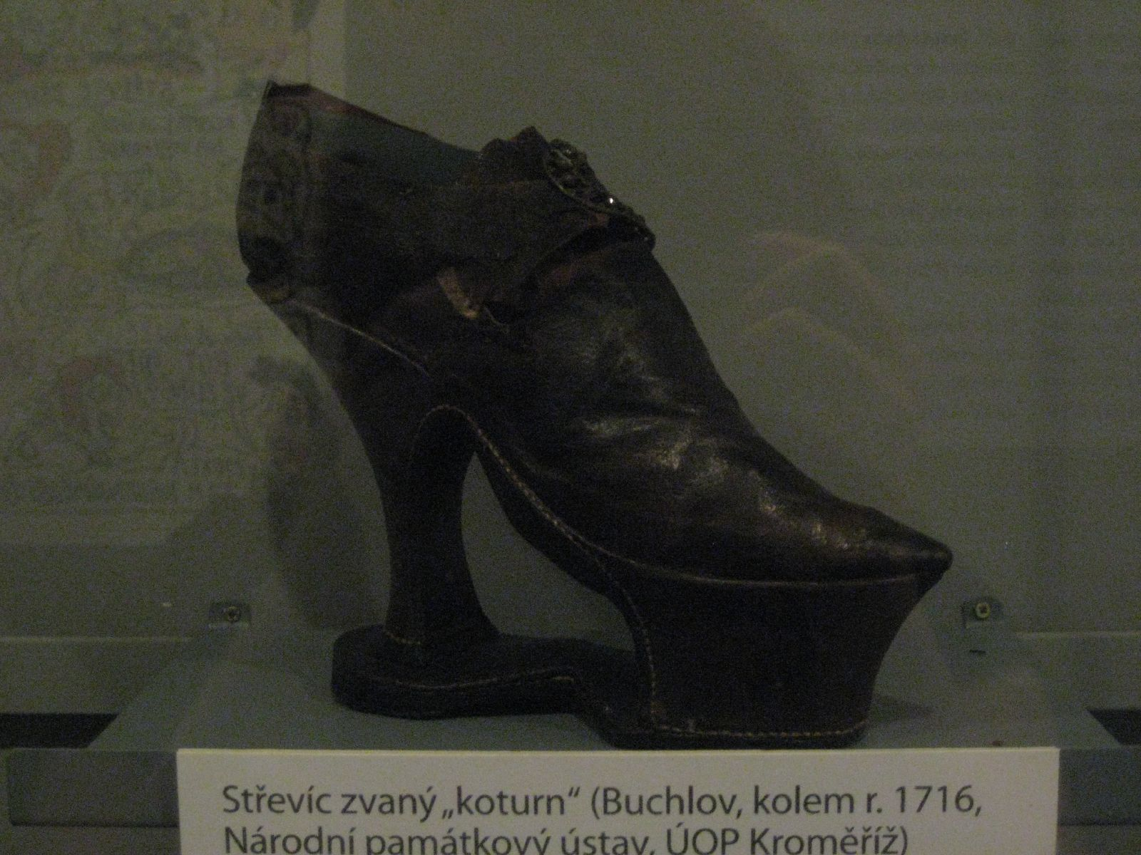 A ladies slipper. 1716.